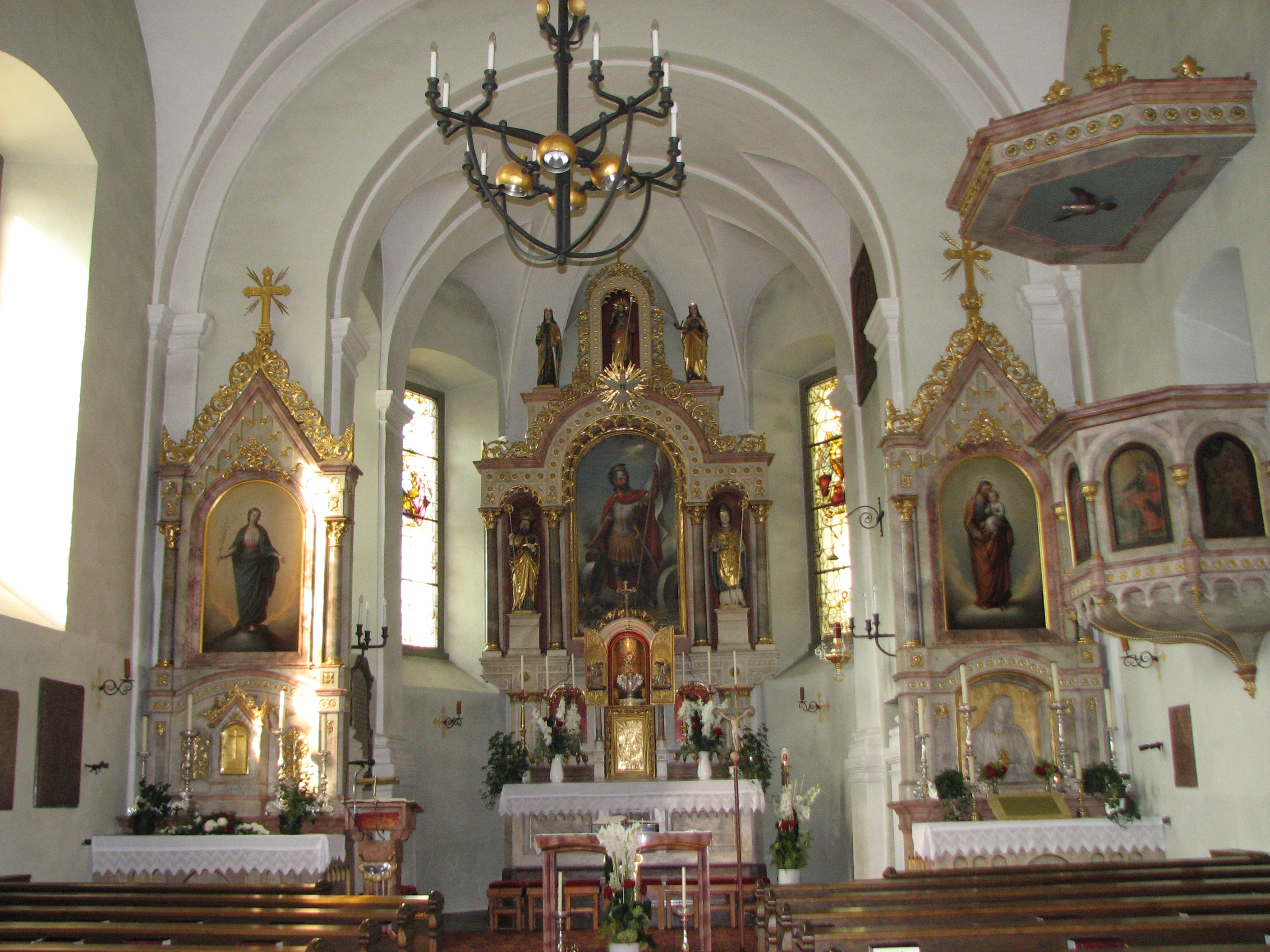 Kath. Pfarrkirche hl. Florian Altarraum